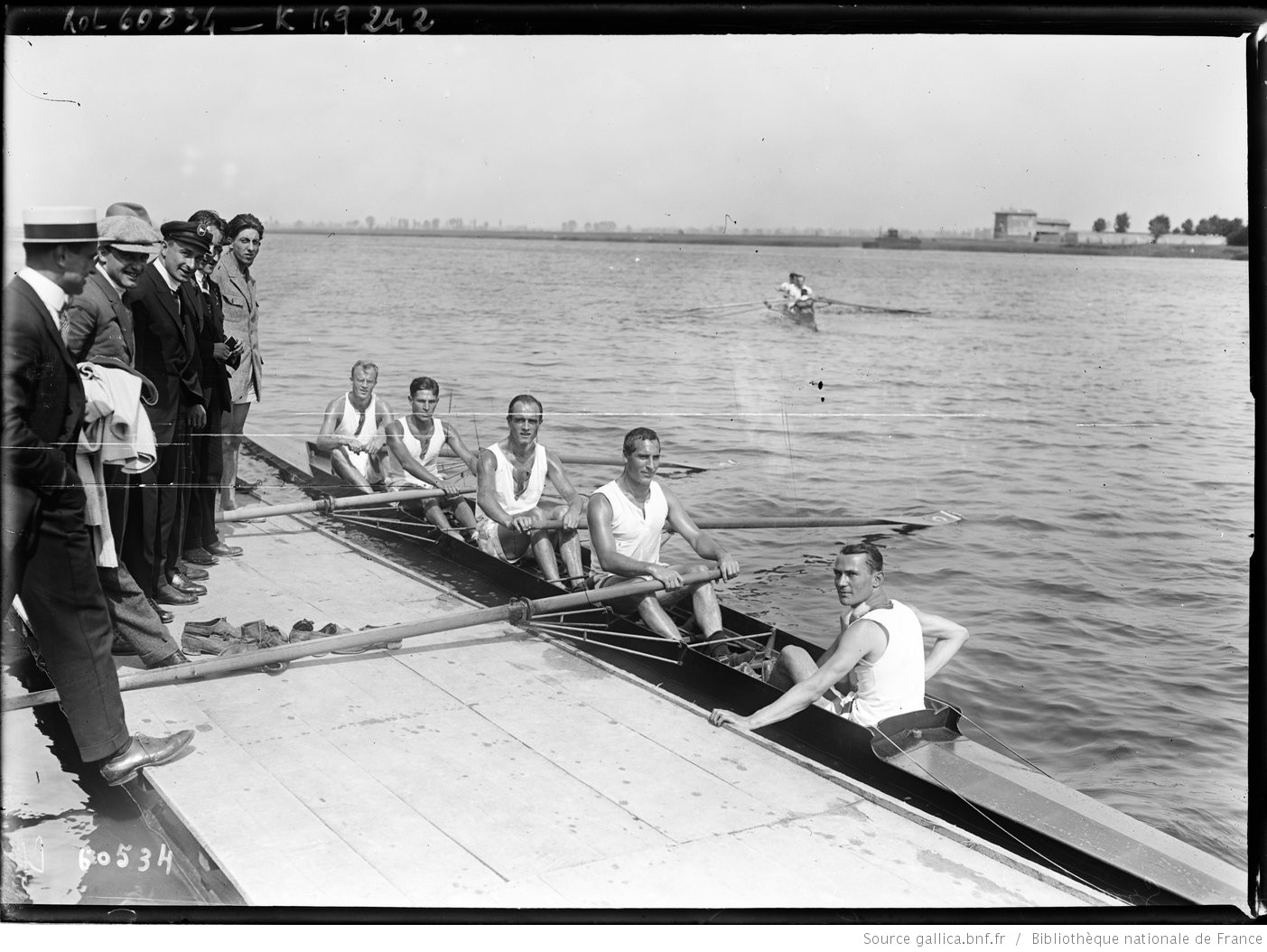 Grasshoper Club Zurich, équipe gagnante du 4 rameurs [de pointe avec barreur, championnats d'Europe d'aviron, Mâcon, 15/8/20] : [photographie de presse] / [Agence Rol]